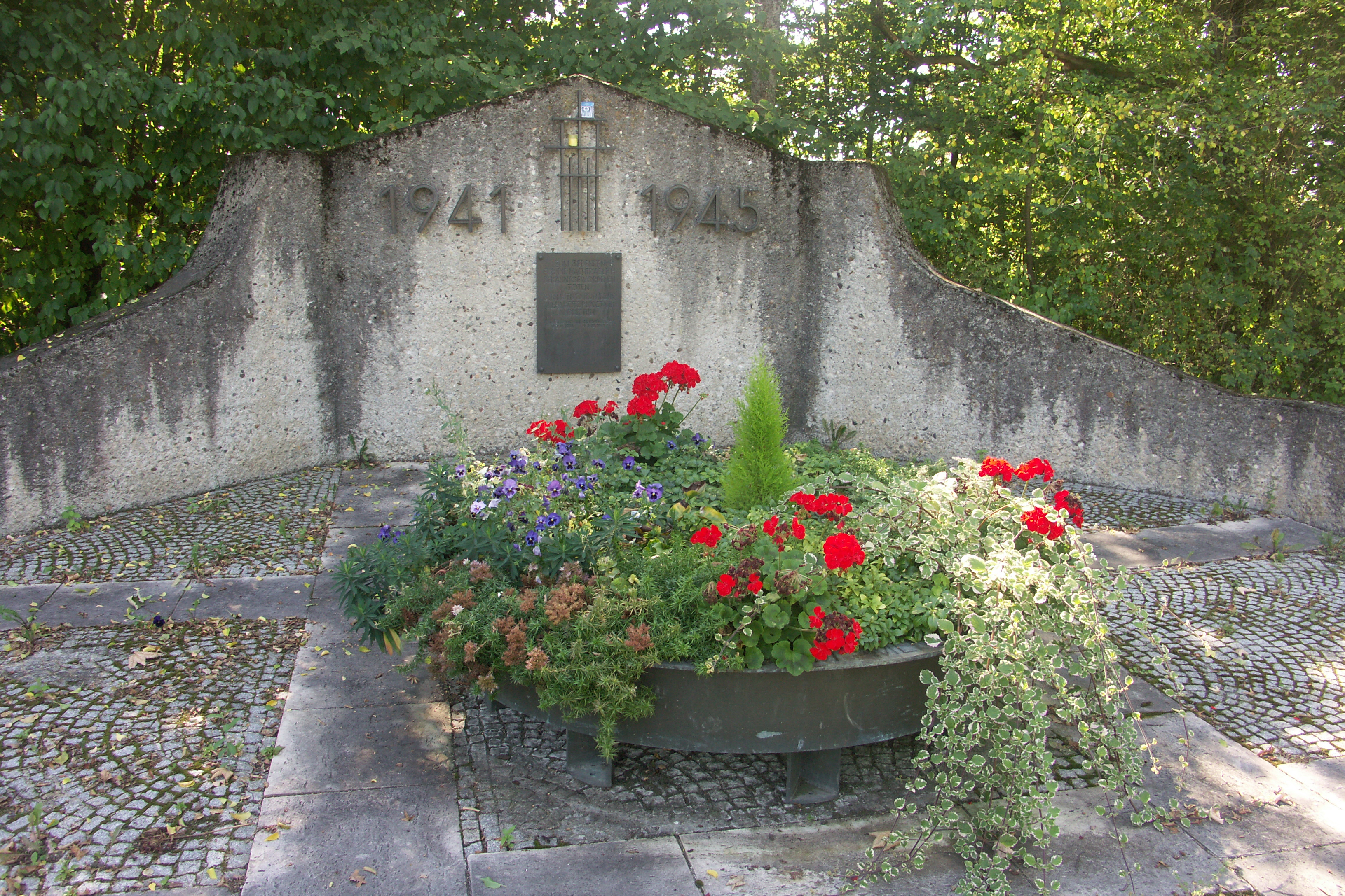 Памятник на кладбище концлагеря Хаммельбург. На доске упомянут командир 172-й стрелковой дивизии генерал-майор Романов М.Т. погибший в лагере и похороненный на этом кладбище